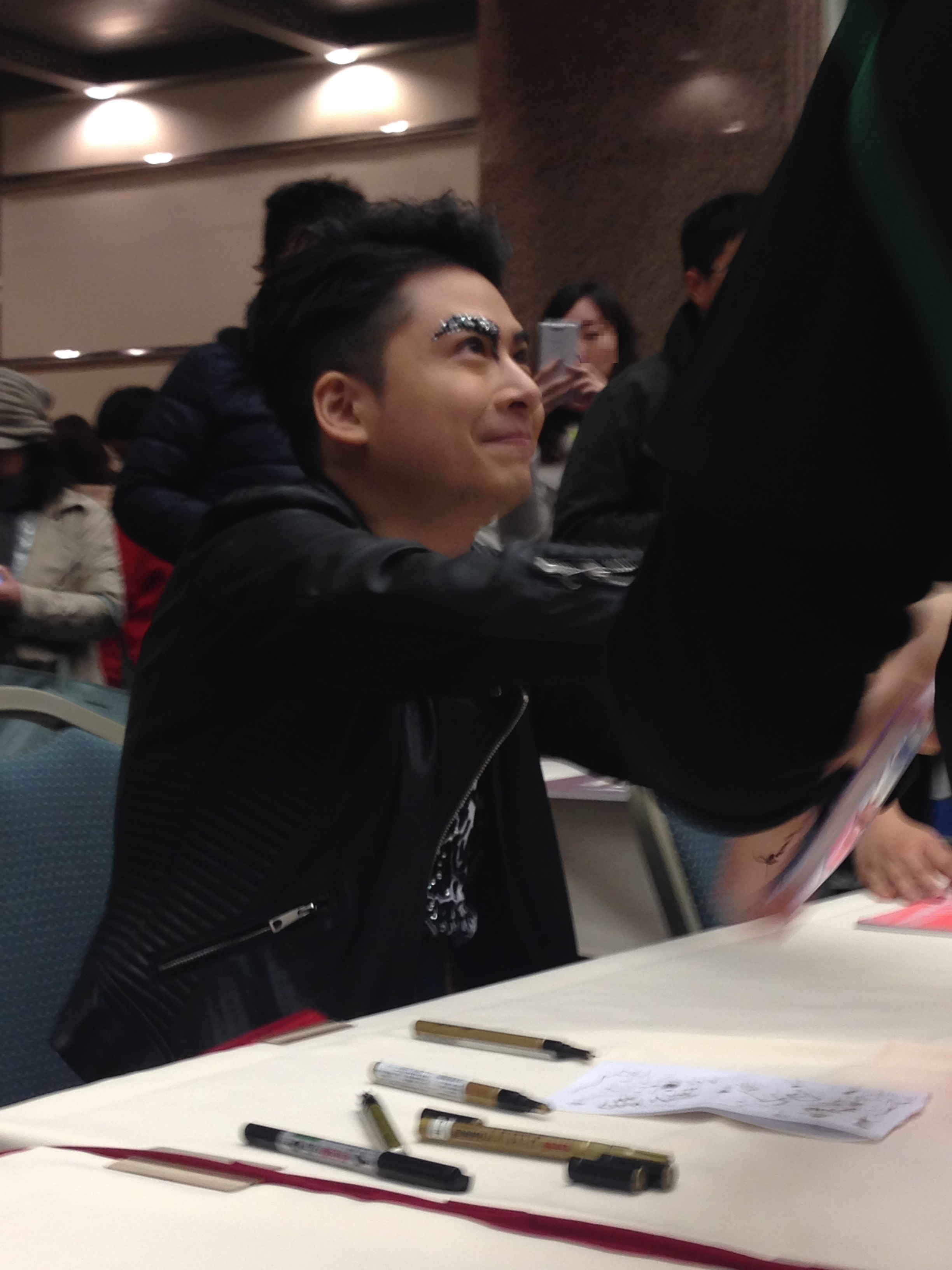 プロフィール用画像